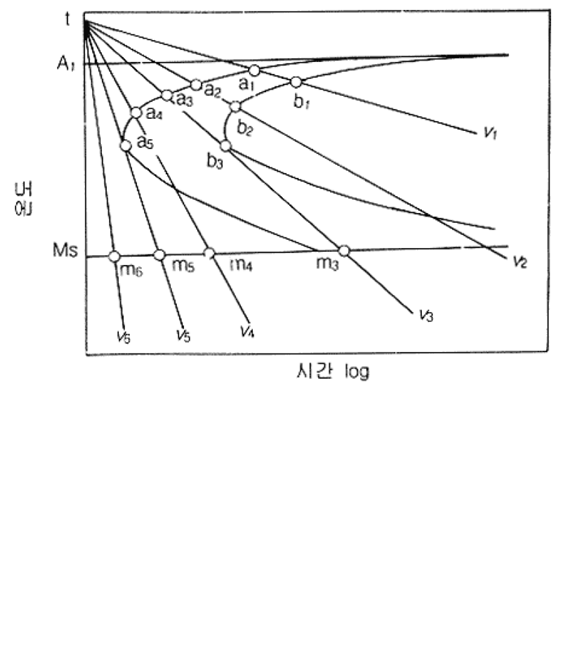 연속 냉각 곡선 그래프이다.